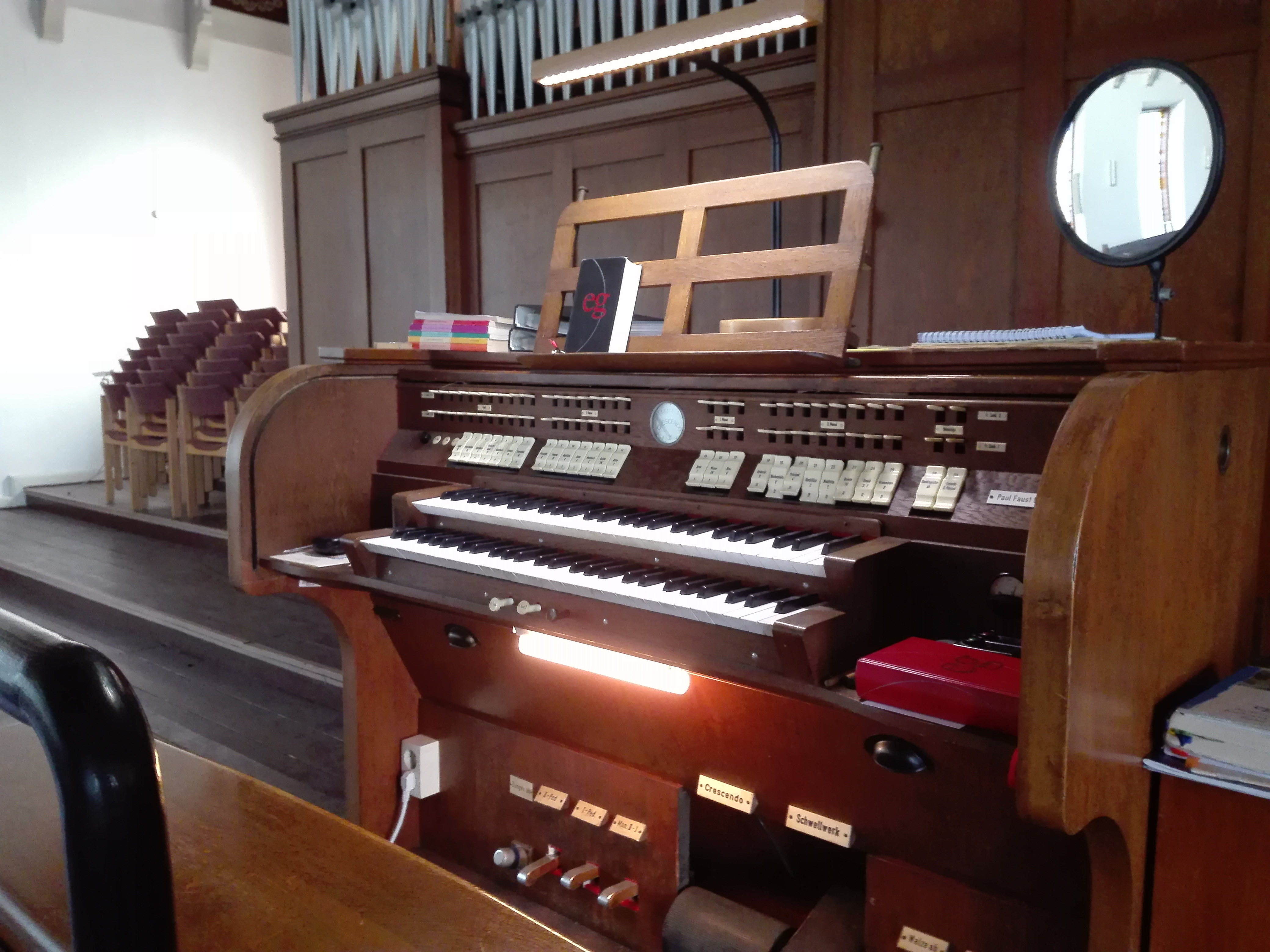 Ansichten der Erlöserkirche in Wuppertal-Wichlinghausen